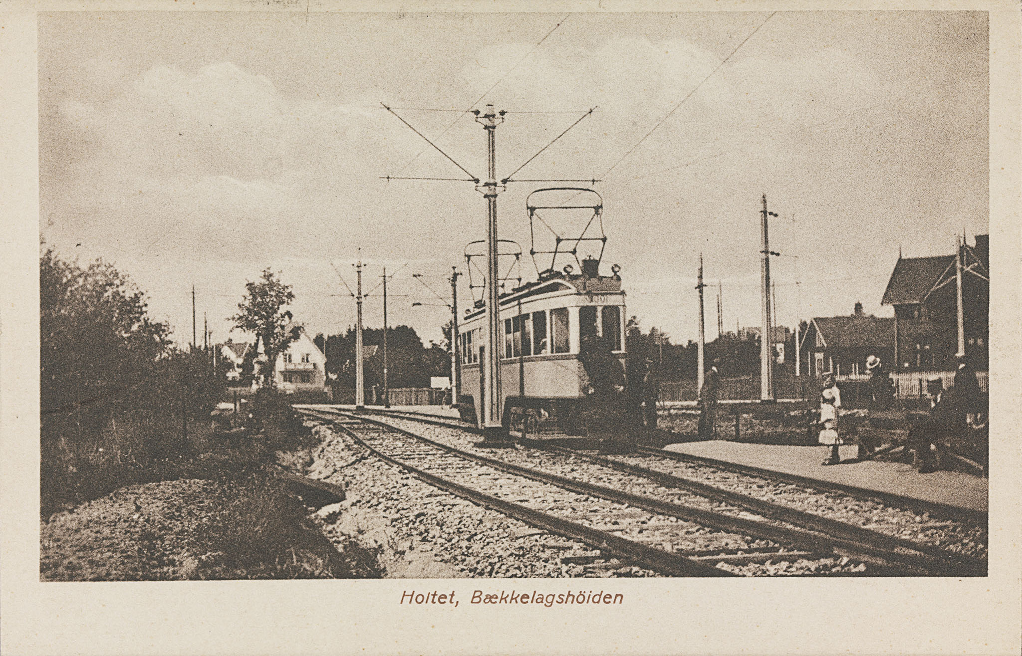 Tittel / Title: Holtet, Bækkelagshöiden Beskrivelse / Description: Postkort. Dato / Date: ukjent / unknown Fotograf / Photographer: ukjent / unknown Utgiver / Publisher: ukjent / unknown Sted / Place: Oslo, Nordstrand, Bekkelagshøgda Eier / Owner Institution: Nasjonalbiblioteket / National Library of Norway Lenke / Link: Bildesignatur / Image Number: bldsa_PK1787